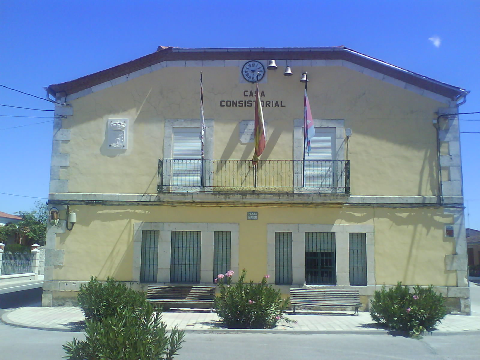 Fachada de la casa consistorial del municipio de Camporredondo, en la provincia de Valladolid (España).